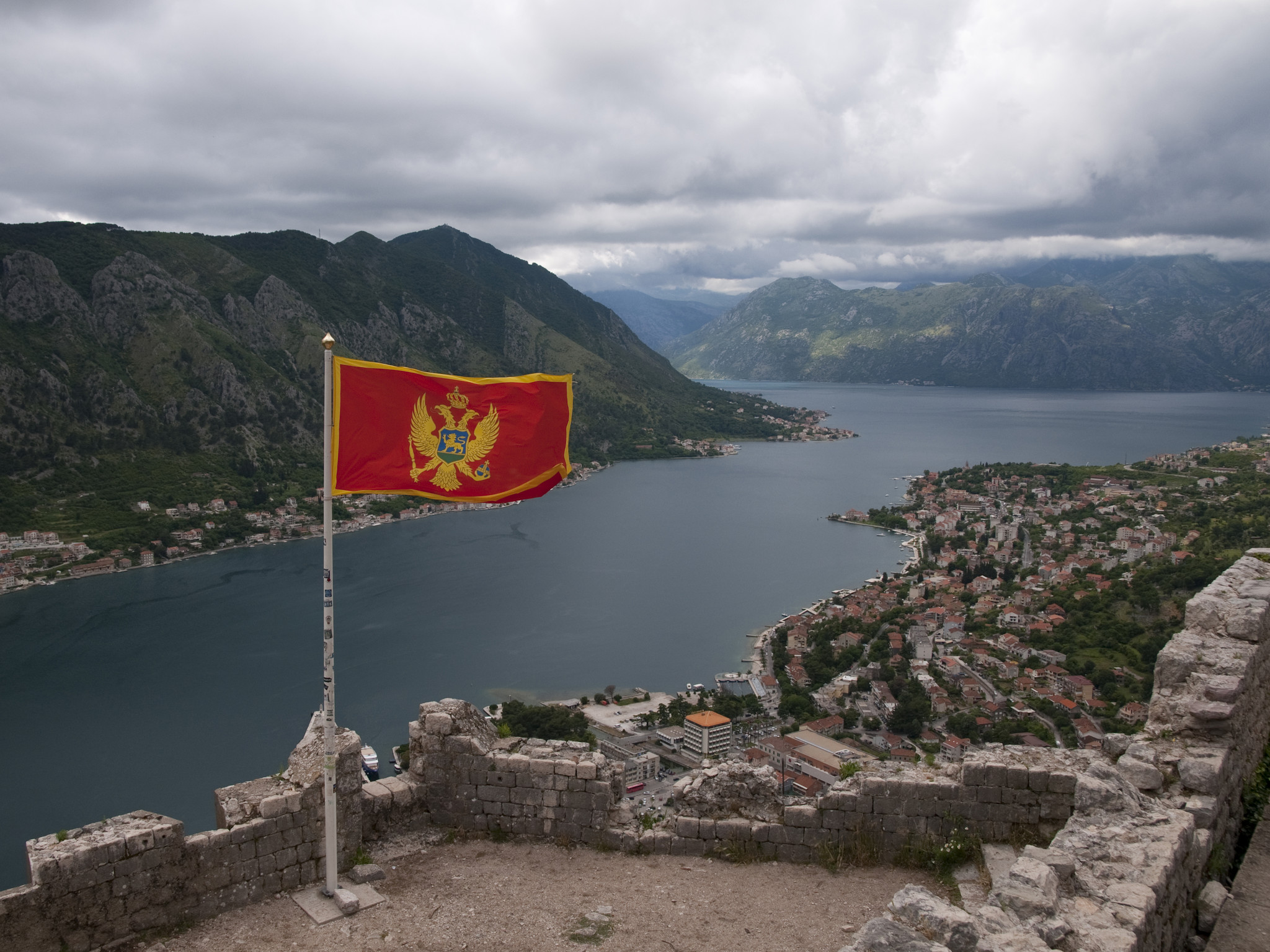 Которский залив, Черногория